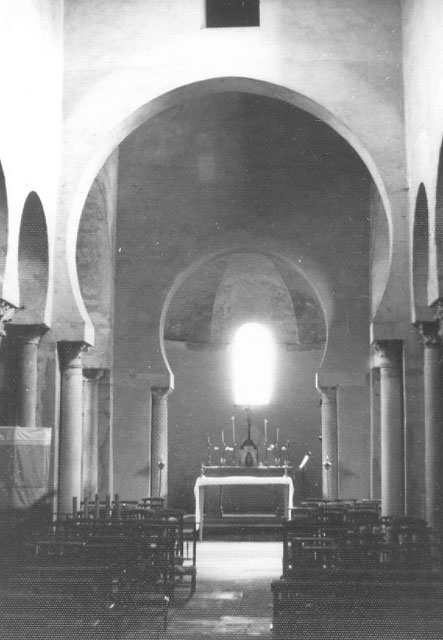 Iglesia de San Cipriano. Interior - San Cebrián de Mazote (Valladolid) - Fotografía. Papel 75 x 105 mm B/N